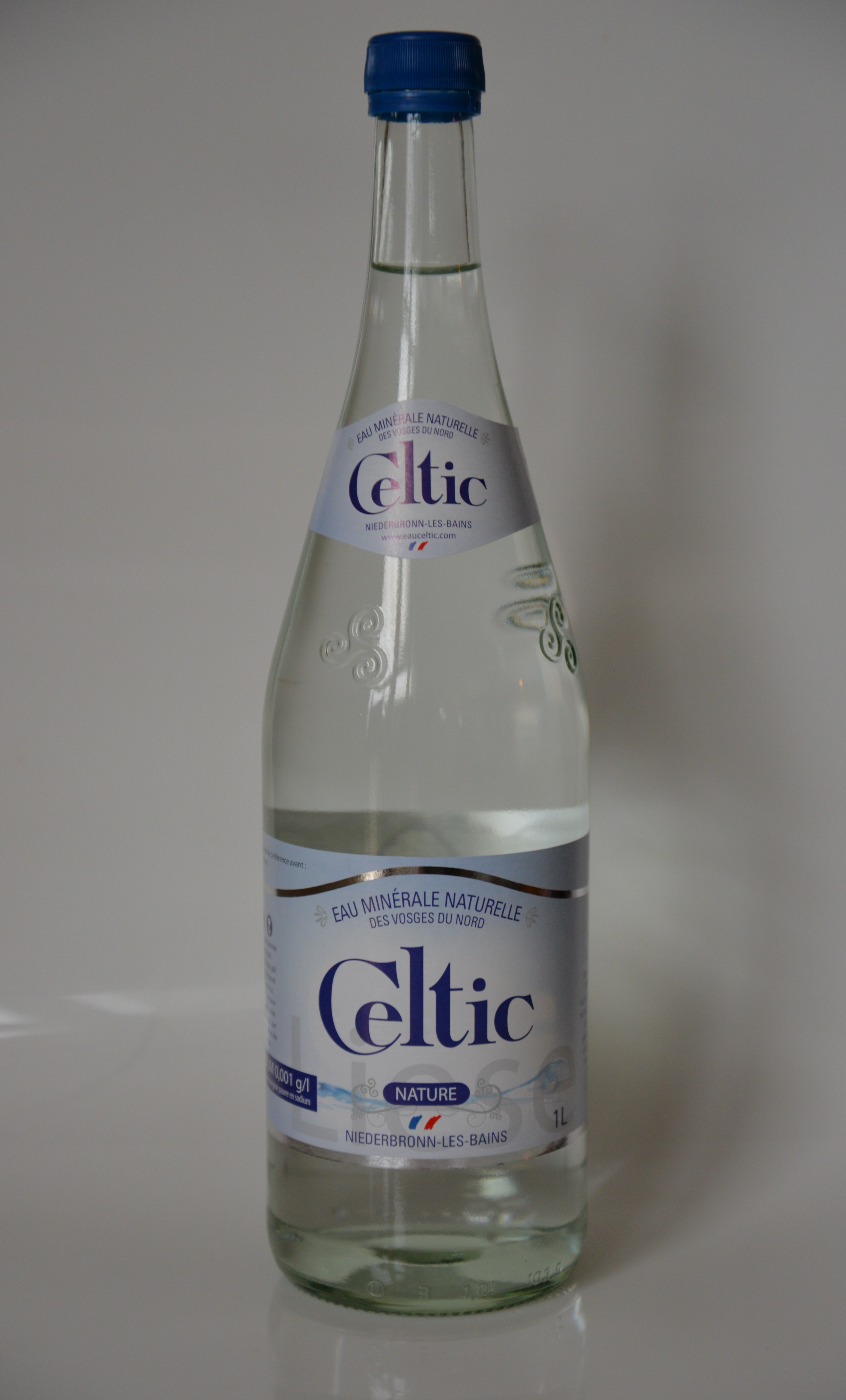 Voici une bouteille en verre de marque Celtic de Niederbronn-les-Bains.